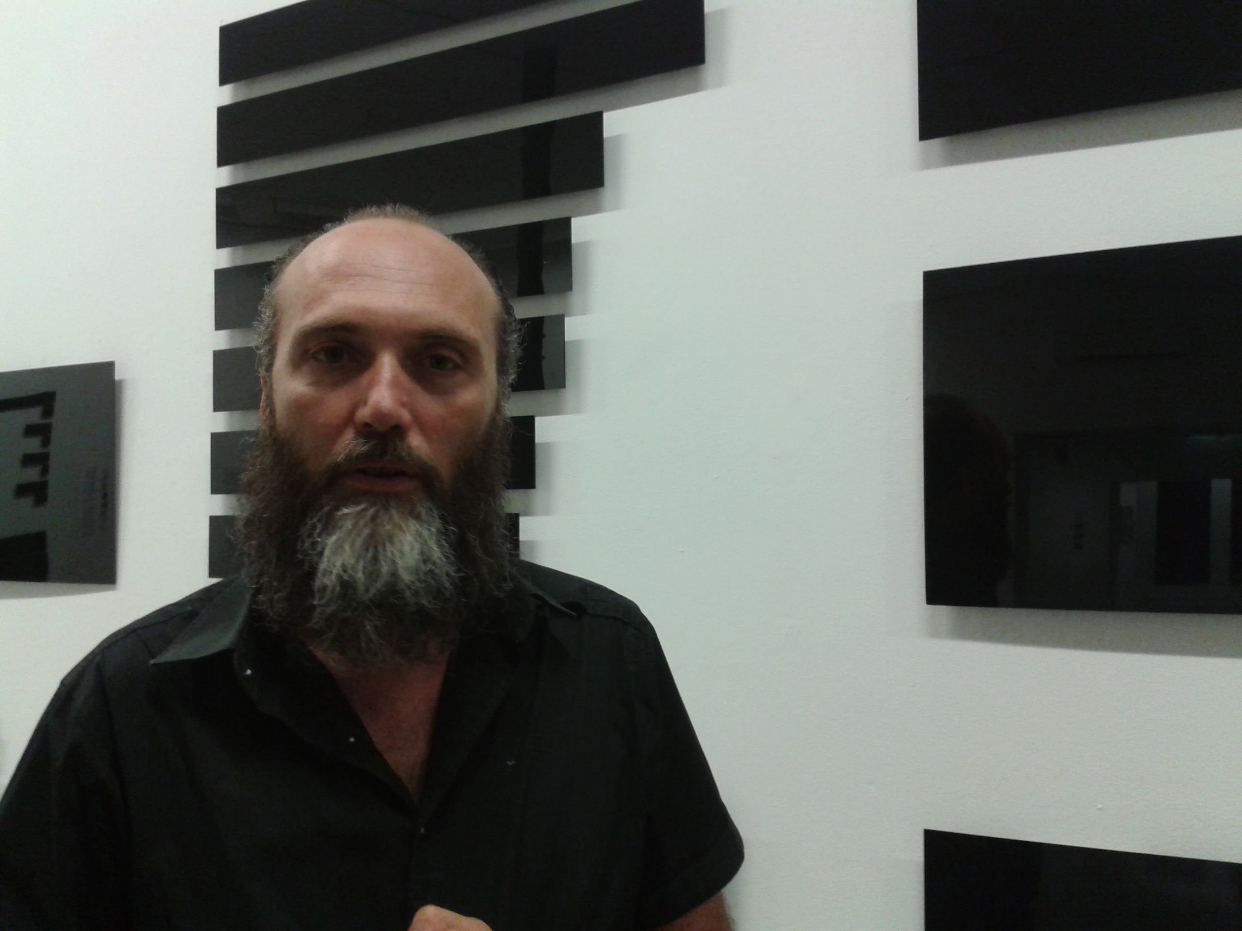 Jaime Serra, fotografiat durant la inauguració de l'exposició "Infografies", celebrada al Museu d'Art Jaume Morera de Lleida